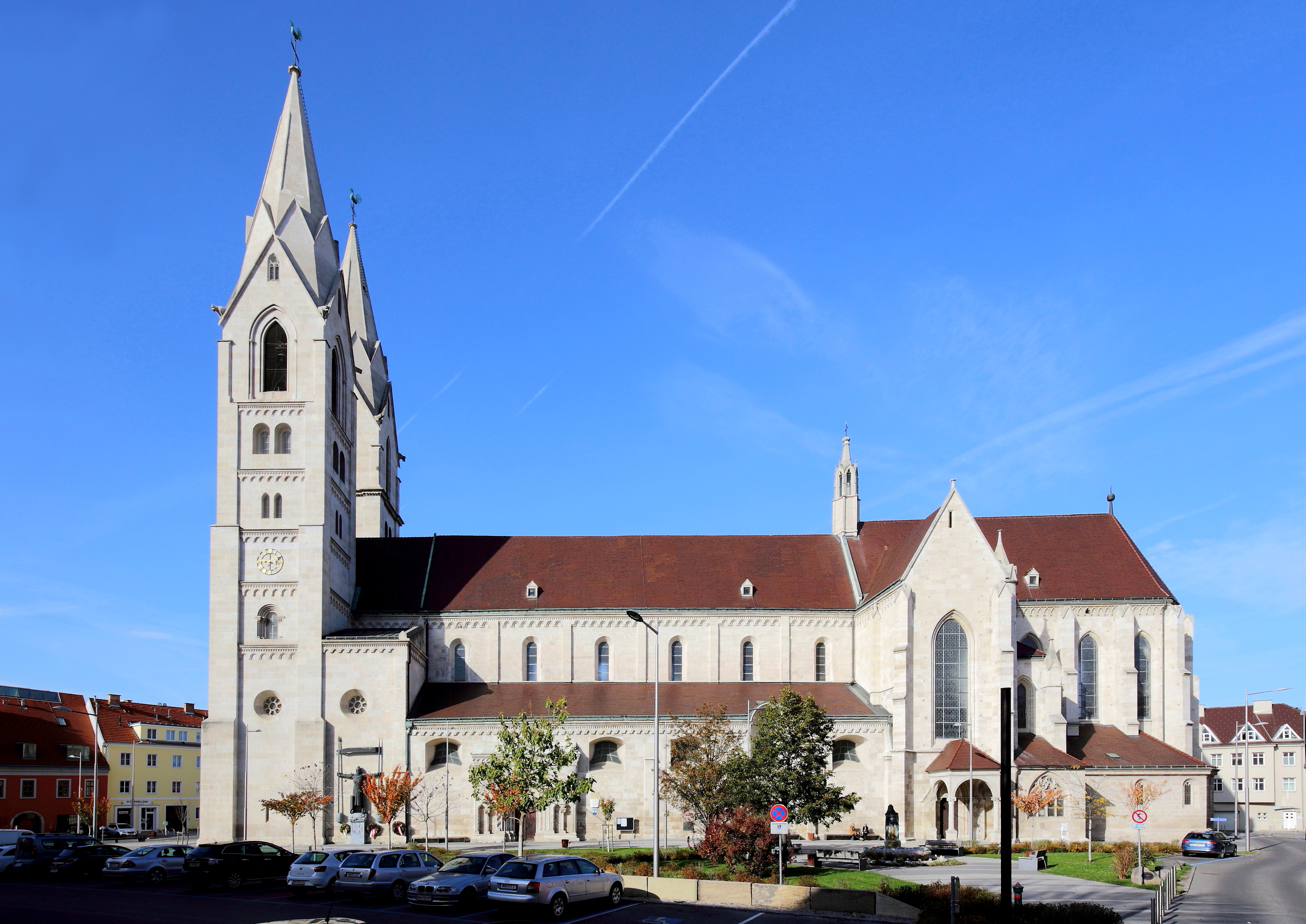 Südostansicht des Domes Mariä Himmelfahrt in der niederösterreichischen Bezirkshauptstadt Wiener Neustadt.Das Langhaus mit dem Westturmpaar wurde von 1193 bis 1279 im spätromanischen-frühgotischen Stil errichtet. Im ersten Viertel des 14. Jahrhunderts wurde das Querschiff und der polygonale Chor mit den Seitenchören sowie eine zweigeschossige Sakristei im Norden errichtet. Unter Kaiser Friedrich III. erfolgten im 15. Jahrhundert Umbauten und eine Neuausstattung. Unter Bischof Ferdinand Graf von Hallweil wurde 1755 der Dom barockisiert. Nach einem Brand 1834 in der Glockenstube wurden die baufälligen Türme 1886 abgetragen und nach den alten Plänen unter der Leitung des Wiener Architekten Richard Jordan von 1892 bis 1899 wieder aufgebaut.